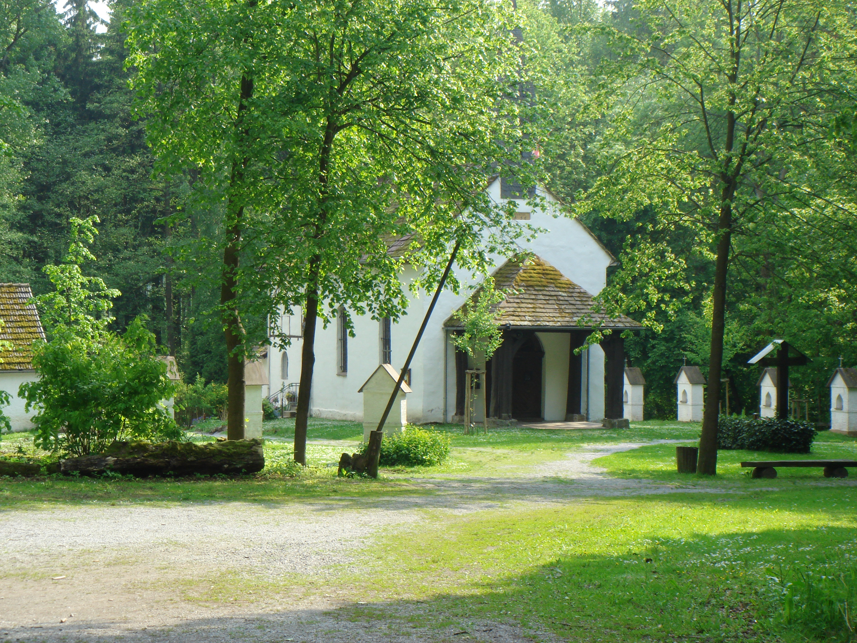 Eremitenklause Klus Eddessen bei Beverungen